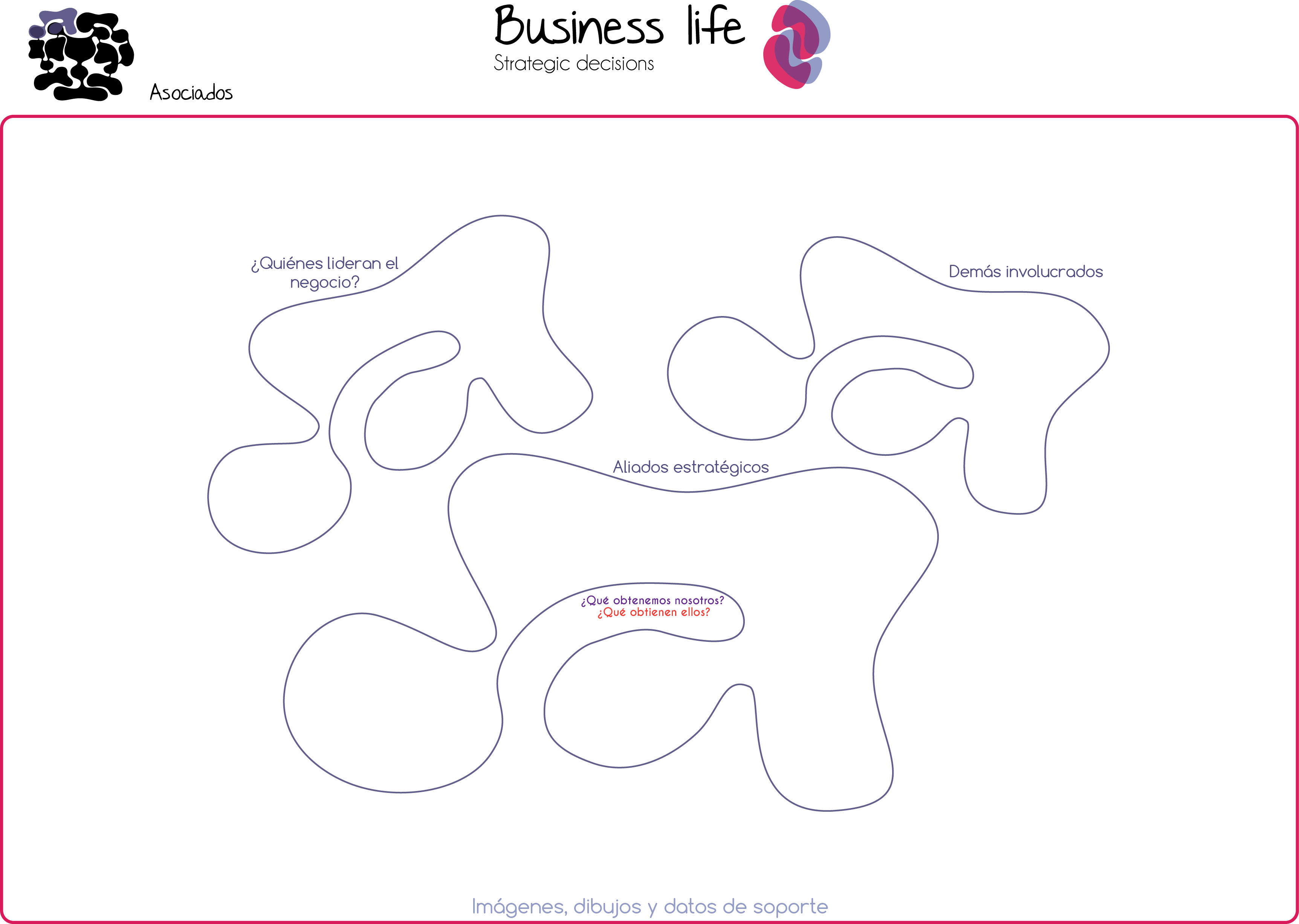 Herramienta para realizar planeación de asociados en el modelo de negocio. Aspectos de aliados estratégicos y equipos de trabajo en estrategias de negocio. (Business life model) (Modelo de negocio Business life)